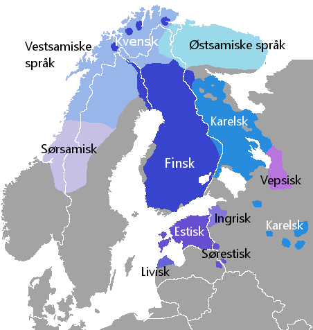 Finsk-ugriske språk i Nord-Europa